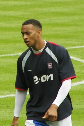 Danny Haynes